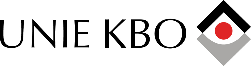 Logo Unie KBO